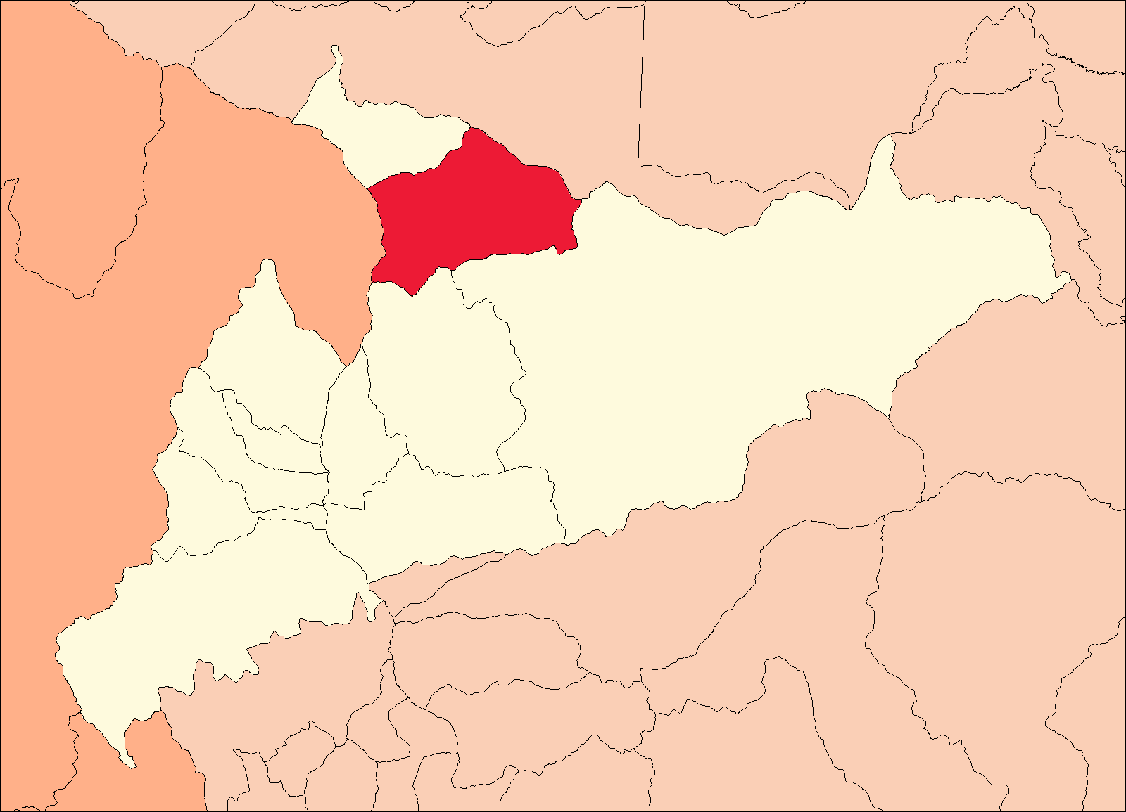 Área del distrito de Jircán.